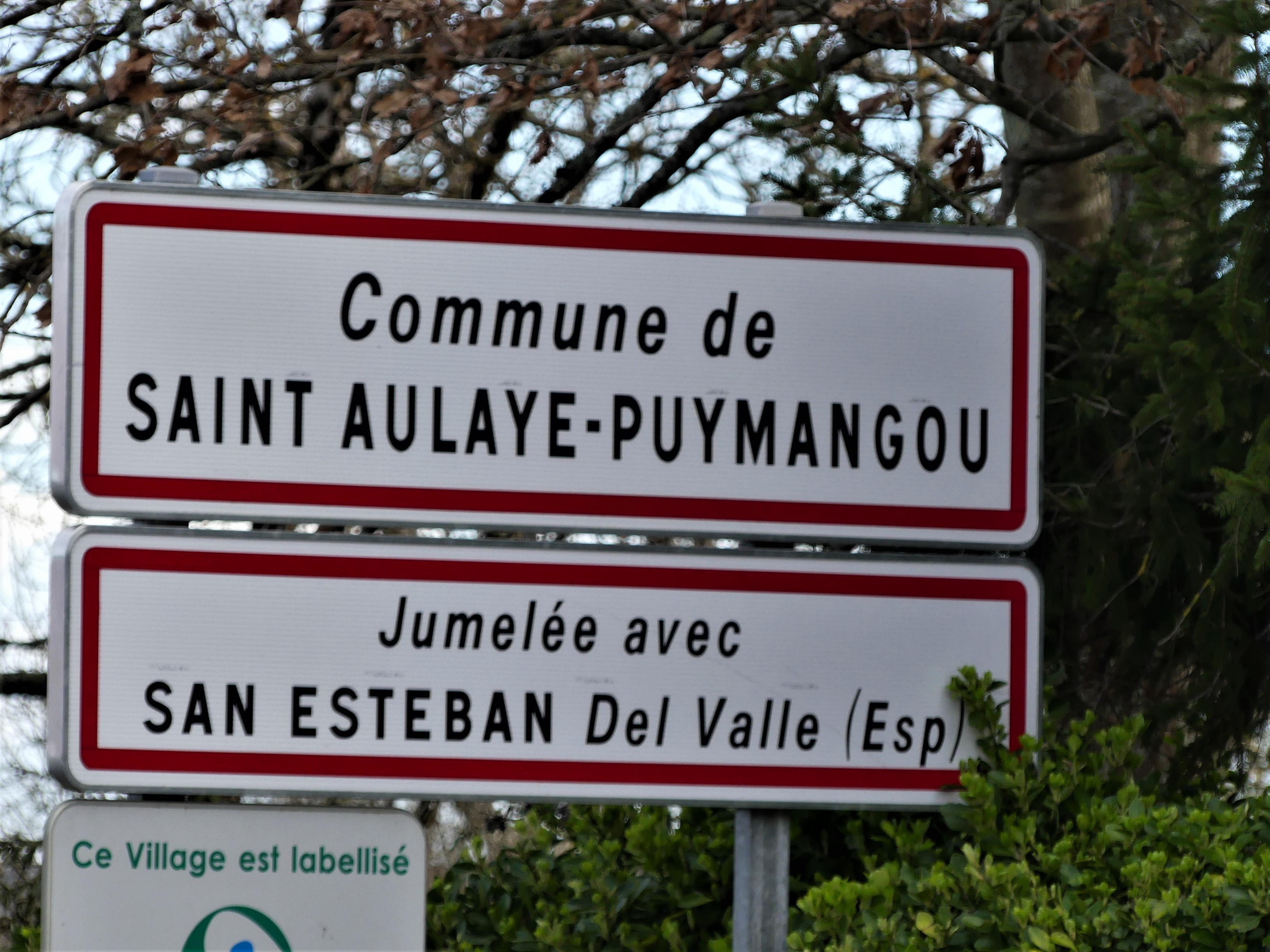 Panneau de jumelage de Saint Aulaye-Puymangou, Dordogne, France.